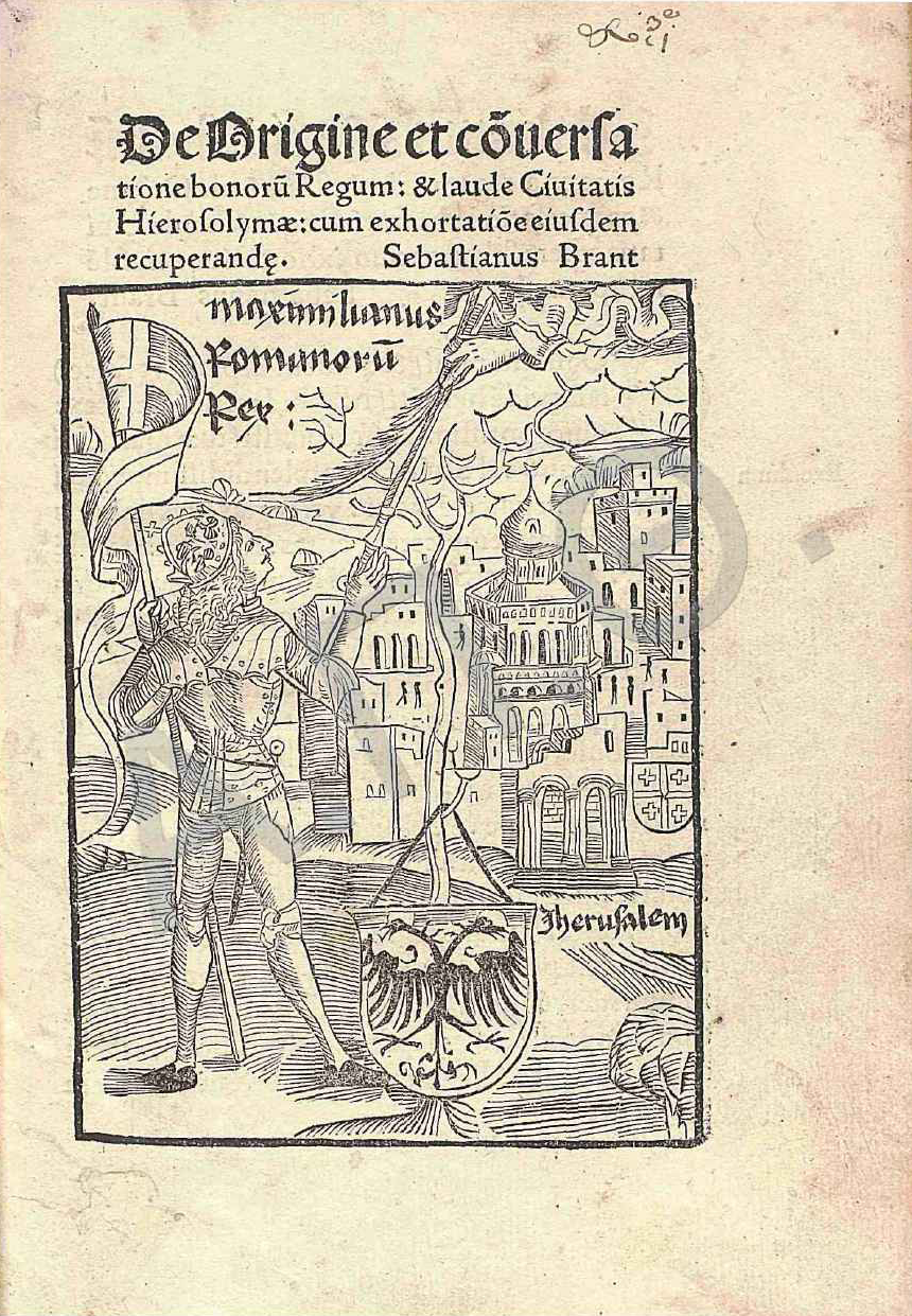 Geschichte Jerusalems. Vermutlich die Titelseite. Leider mit Wasserzeichen.